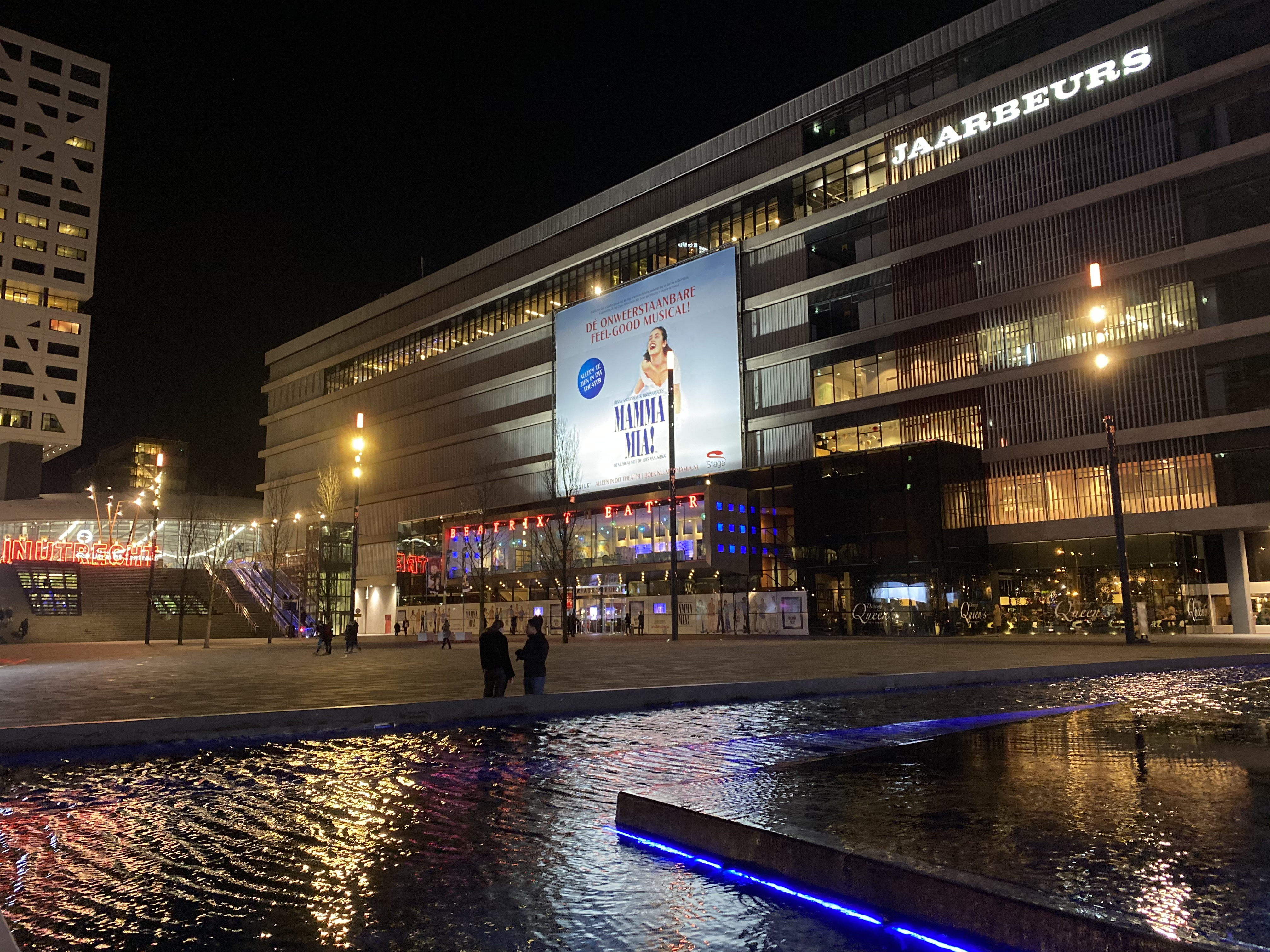 Foto genomen vanaf de uitgang van Parking Beatrix Theater